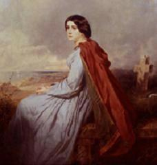 Evangeline